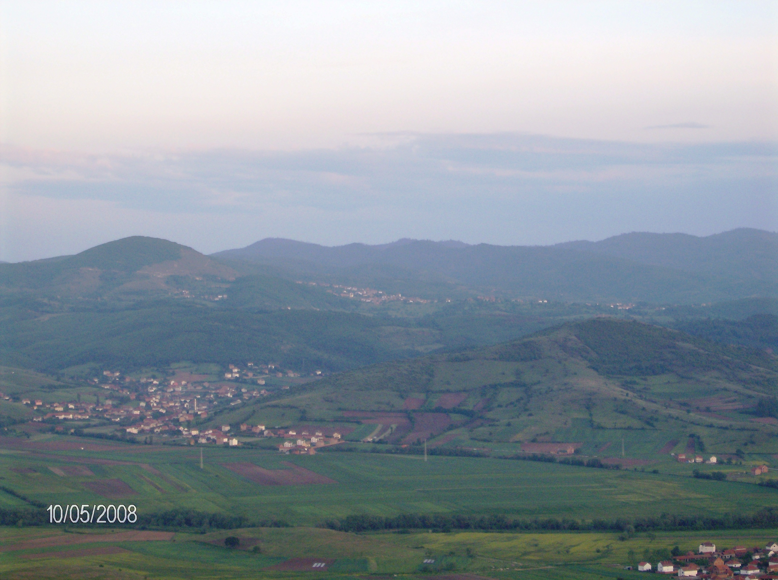 Pamje e fshatit Skifteraj dhe Stubllës